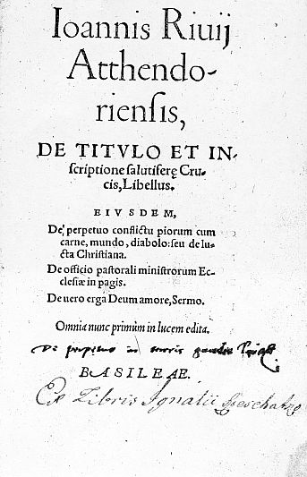 Titelblatt einer Erstausgabe von Johannes Rivius von 1548